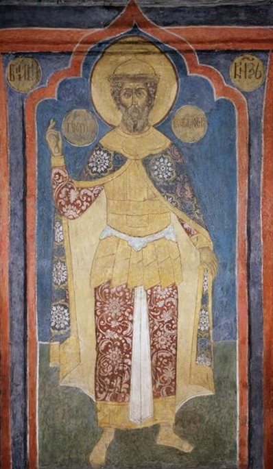 Архангельский собор. Условные портреты князей на столпах